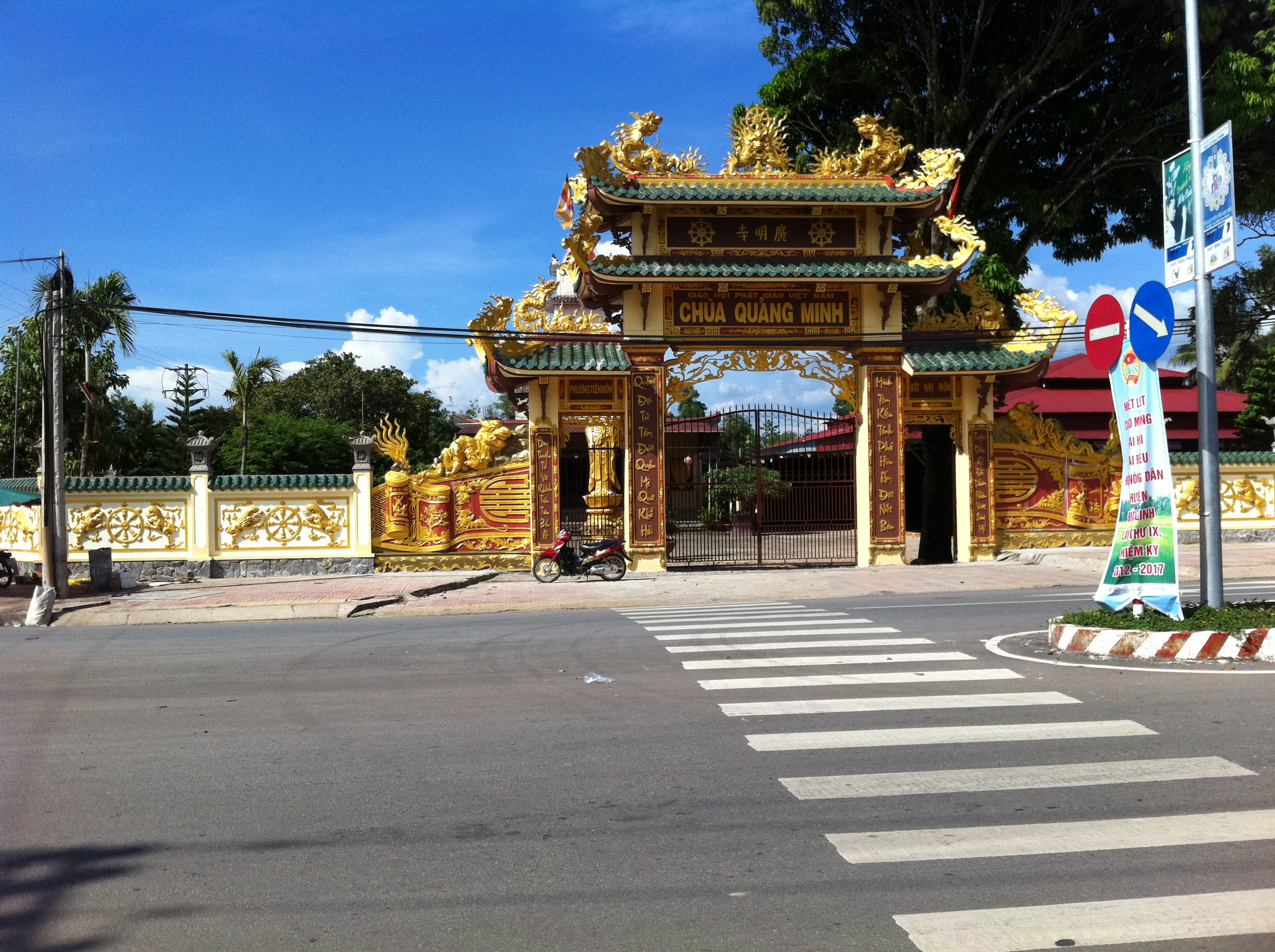 Chùa Quang Minh, Đức Linh